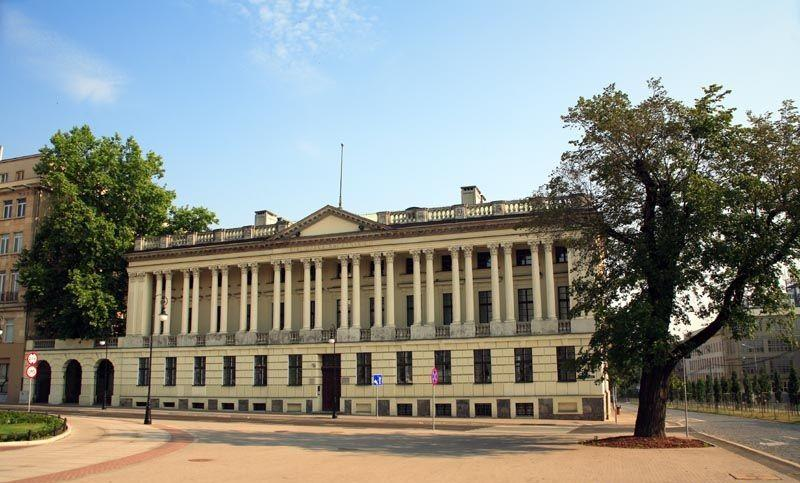 Polska by Ewa and Maek Wojciechowsy